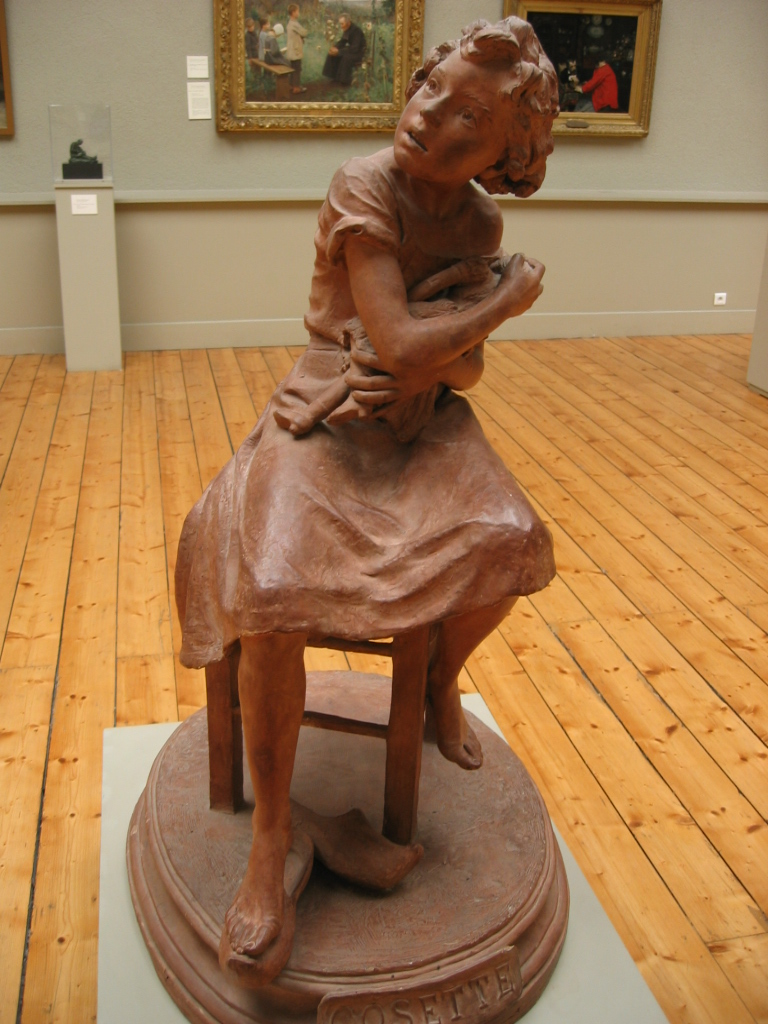 Cosette - Platre de Marthe La-Fizeliere-Ritti - Personnage des Misérables de Victor Hugo - Musée beaux-arts de Besançon.